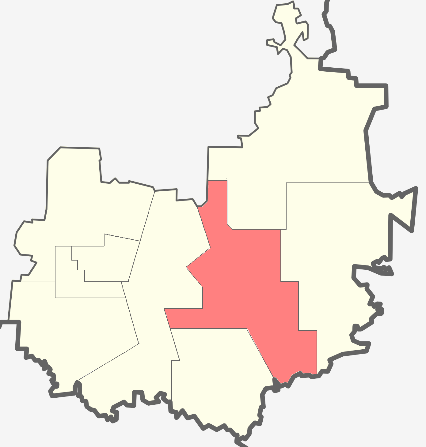 Ефимовское городское поселение на карте Бокситогорского района Ленинградской области.